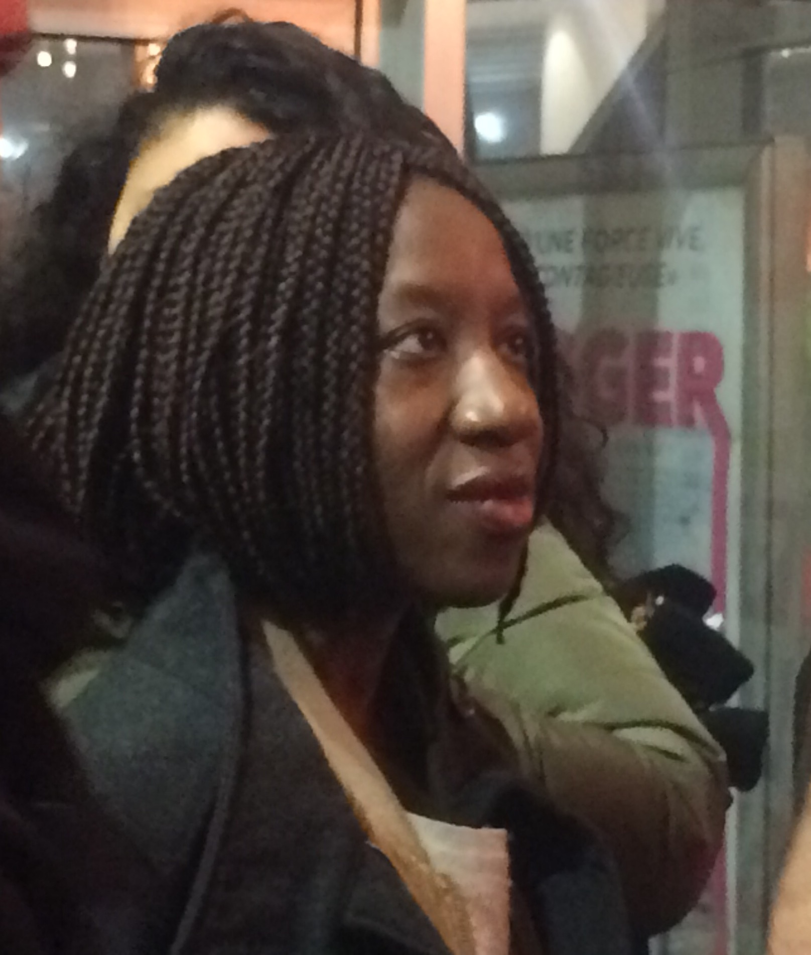 L'actrice malienne Mariame Ndiaye au cinéma l'Ecran à Saint-Denis